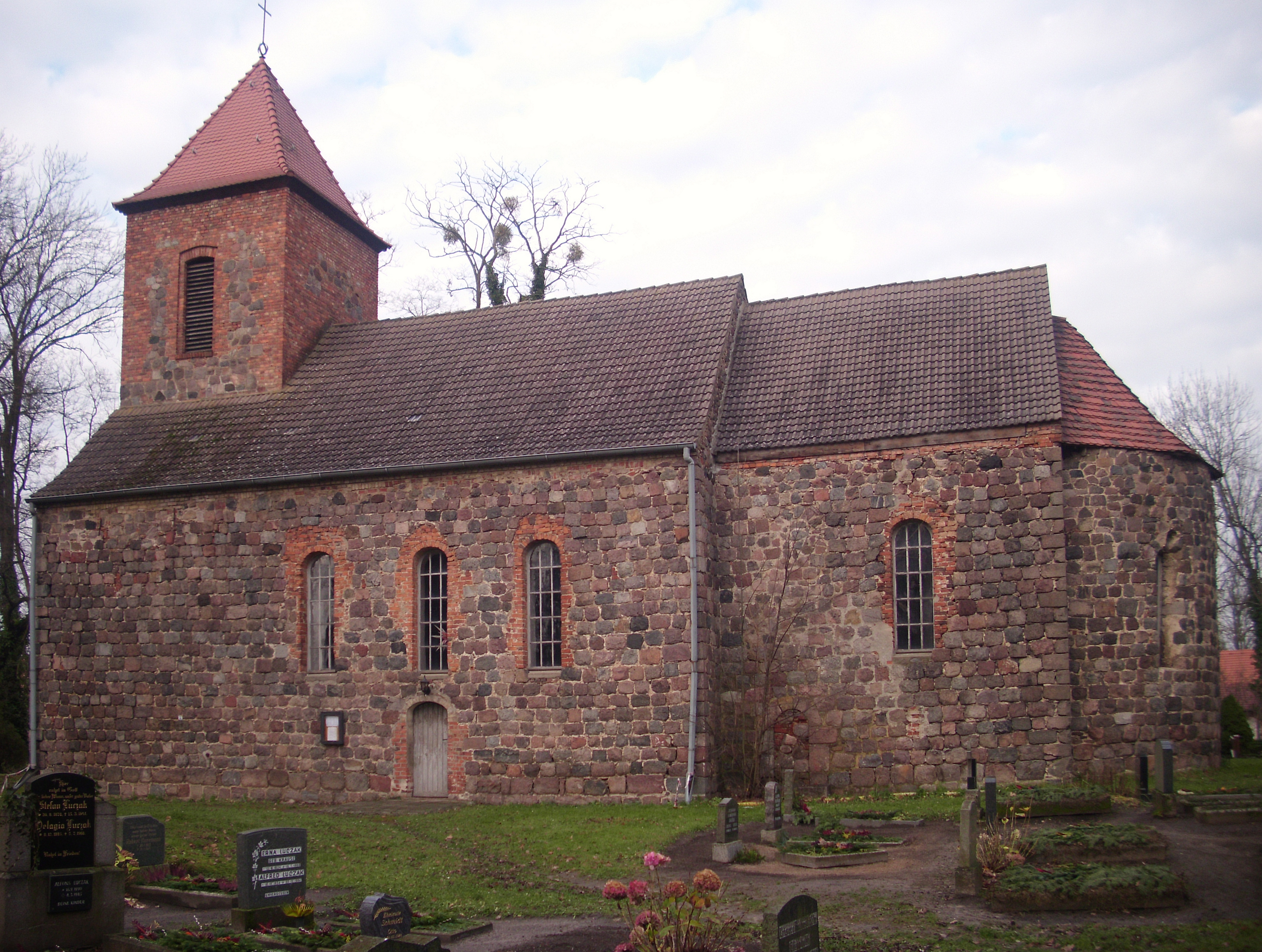 Kirche Ihlow, Oberbarnim, Brandenburg, Märkische Schweiz